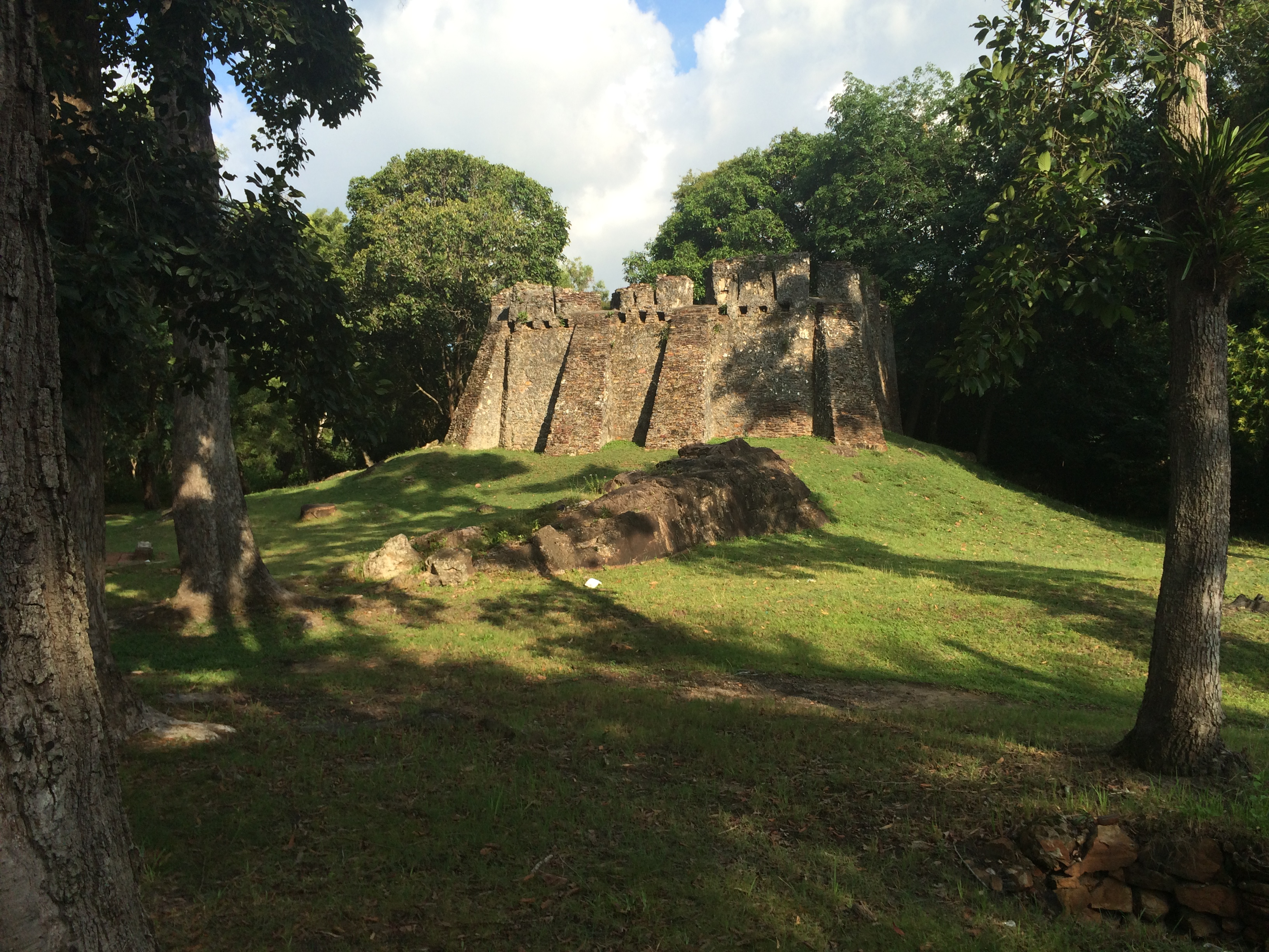 Sathing Mo, Singhanakhon District, Songkhla, Thailand